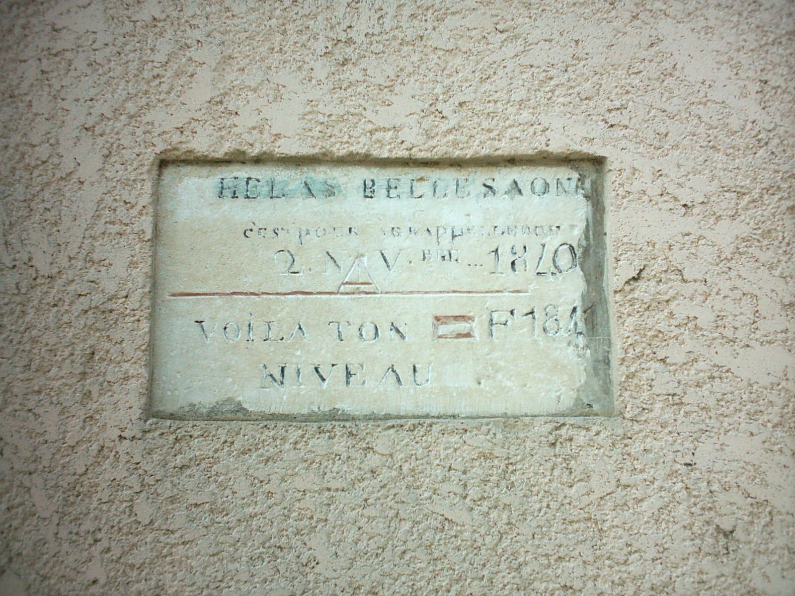 Pierre gravée en souvenir de la crue de la Saône du 2 novembre 1840 "HELAS BELLE SAONE, C'EST POUR SE RAPPELLER DU 2 NOVEMBRE 1840...1841...VOILA TON NIVEAU" Localisation : Sur un mur d'habitation, lieu-dit Varennes, commune de Quincieux (69) Auteur: Vendenesse